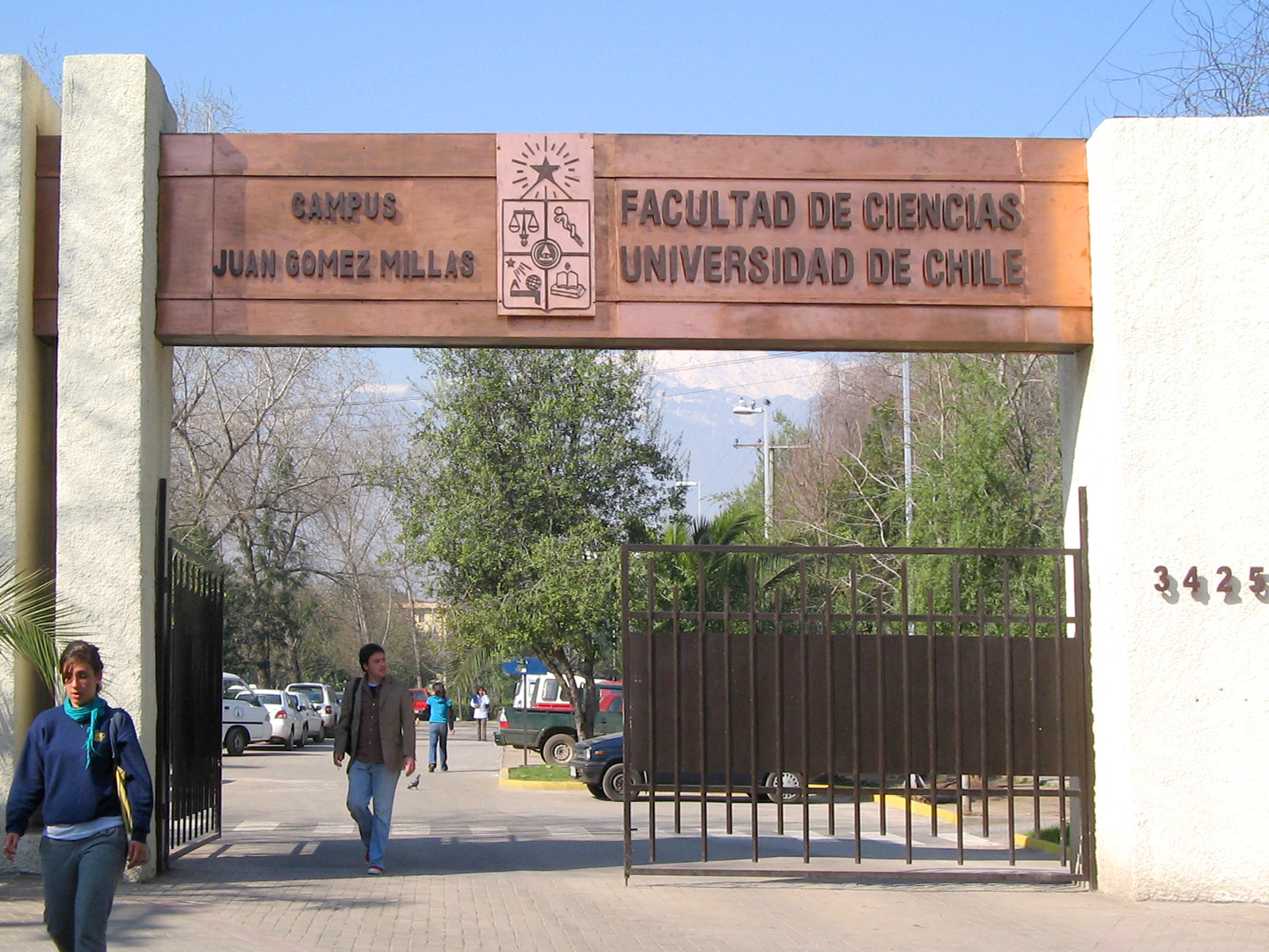 Entrada por calle Las Palmeras al campus Juan Gómez Millas ubicado en Ñuñoa.